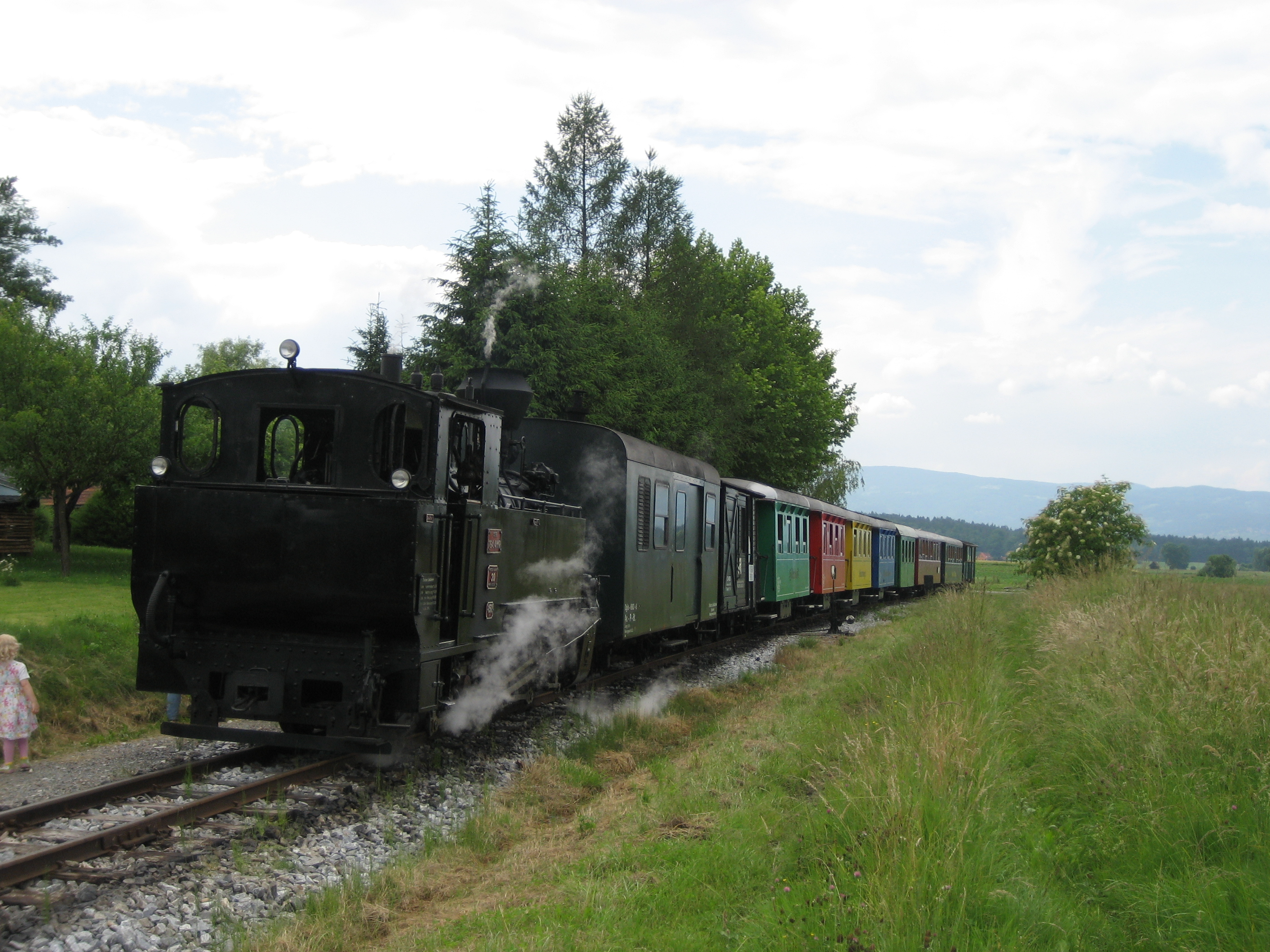 Stainzerbahn vulgo "Stainzer Flascherlzug" in der Steiermark, Österreich ("Stainzerbahn" in Styria, Austria)